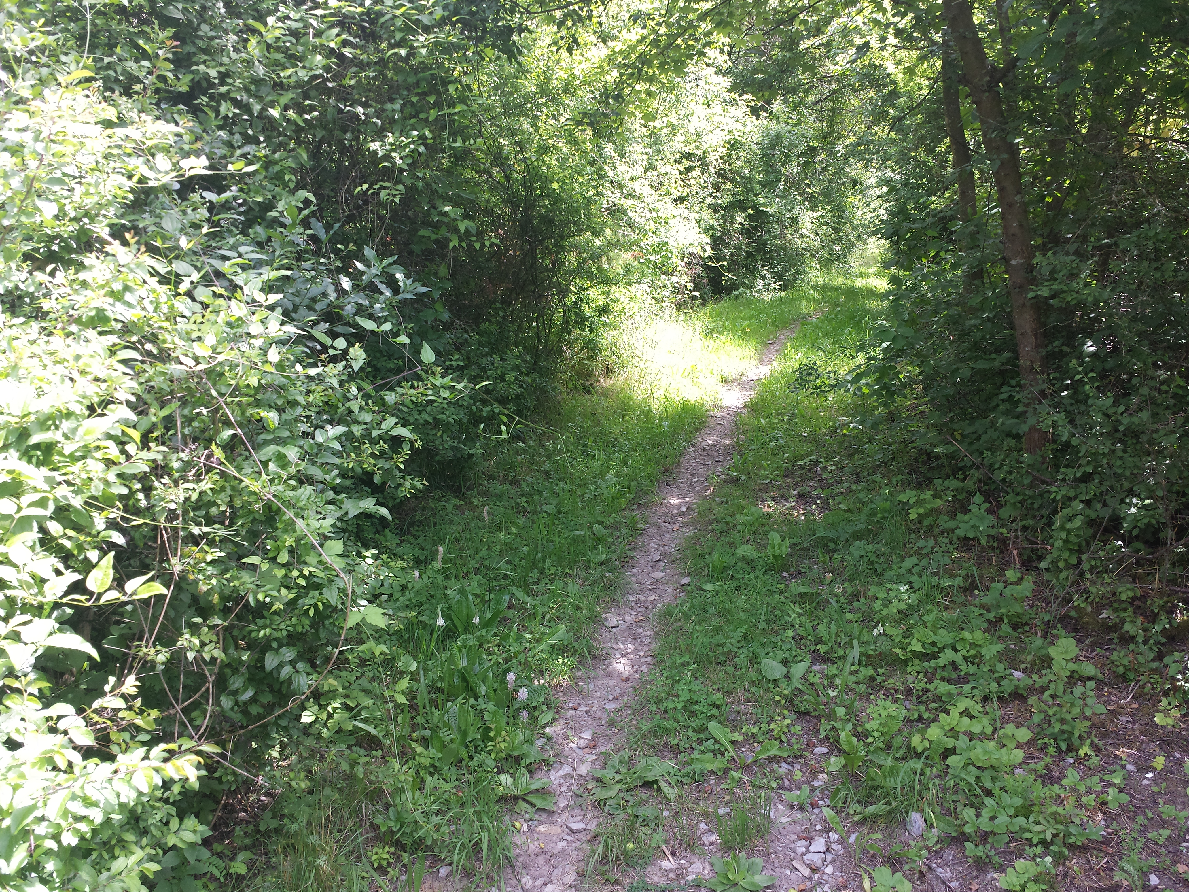 Mountainbiketour "Links der Tauber". Auf dem Bild ist ein Trail zu sehen. Der Trail beginnt auf einer Anhöhe bei Hof Steinbach und führt bis ins Tal an den Radweg zwischen Tauberbischofsheim und Dittwar.